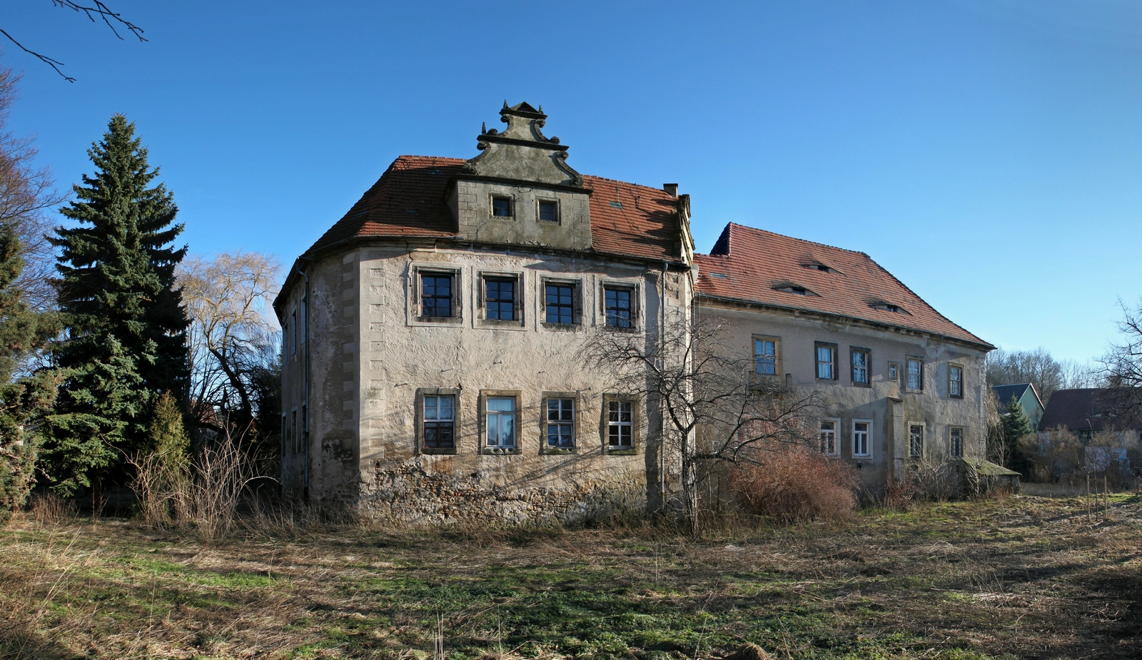 Ottendorf (Gemeinde Bahretal): Blick auf Schloss Ottendorf. Die Anlage geht vermutlich auf eine alte Wasserburg zurück, welche die Burggrafen von Dohna zur Erschließerung und Sicherung des Gebietes im Dohnaer Hinterland erbauen ließen. Zu den späteren Besitzern zählten u.a. die Familien von Bärenstein (1489), von Lindenau (1591) und von Carlowitz (bis 1945). Derzeit steht das Anwesen leer und verfällt seit mehreren Jahren zusehends.